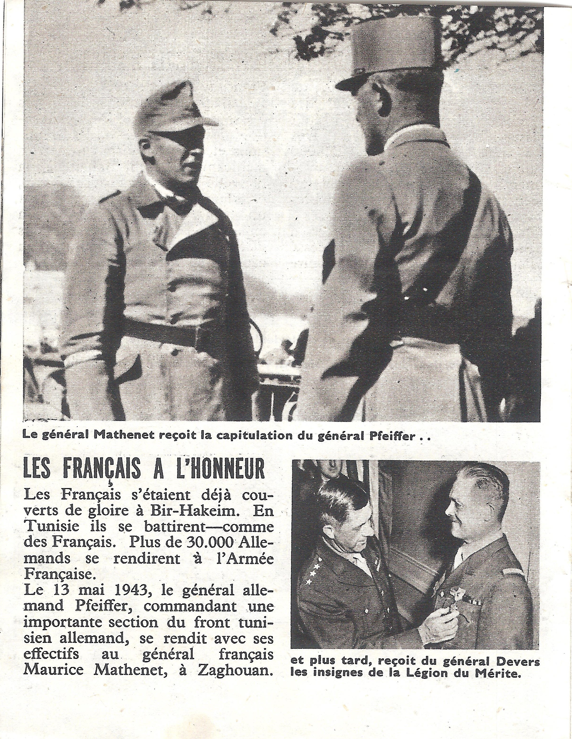 Cette illustration est extraite d’un fascicule de 30 pages, mesurant 102×132 mm (en fait, 4 pouces par 5 pouces et 3/16), intitulé « Réarmés ». On peut le dater grâce à une déclaration attribuée au président Roosevelt au dos de la dernière page, datée 2 janvier 1944, qui dit : « J’envisage le jour, par bonheur proche aujourd’hui, où les Français à l’intérieur et à l’extérieur de la France se joindront à leur alliés américains et britanniques pour chasser l’oppresseur du sol français. » Une note précise que ce fascicule fut « Publié par l’office d’information de Guerre des Etats-Unis d’Amérique U S F 91 » (Office of War Information). Il fut probablement jeté sur la France occupée par un avion américain pendant la campagne de bombardement de la première moitié de 1944, sans doute dans la région de Rennes où son propriétaire le ramassa, et dans les archives duquel il fut retrouvé en 2019. Archives Jean Grosdidier de Matons